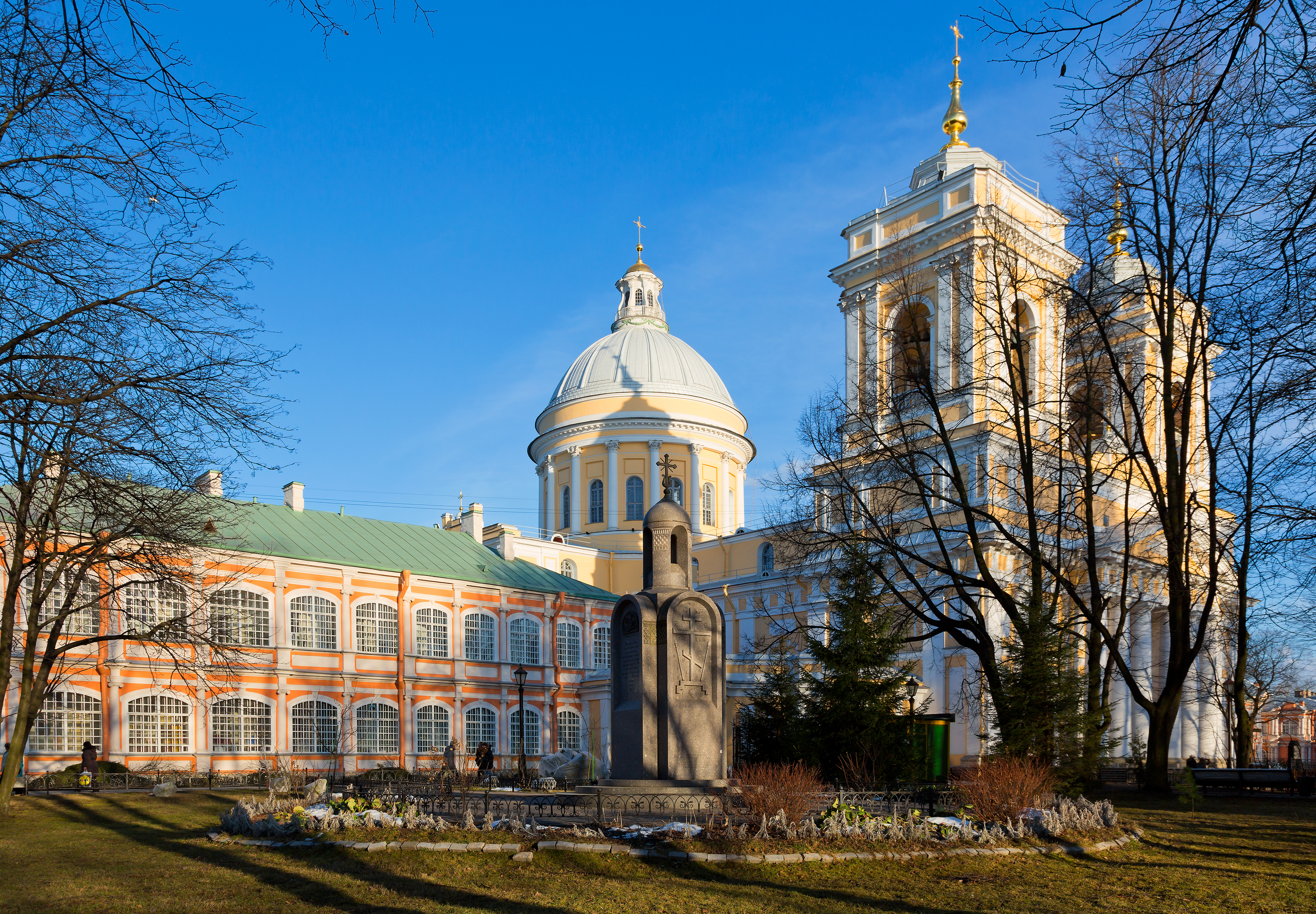 Санкт-Петербург, р. Монастырки наб., 1